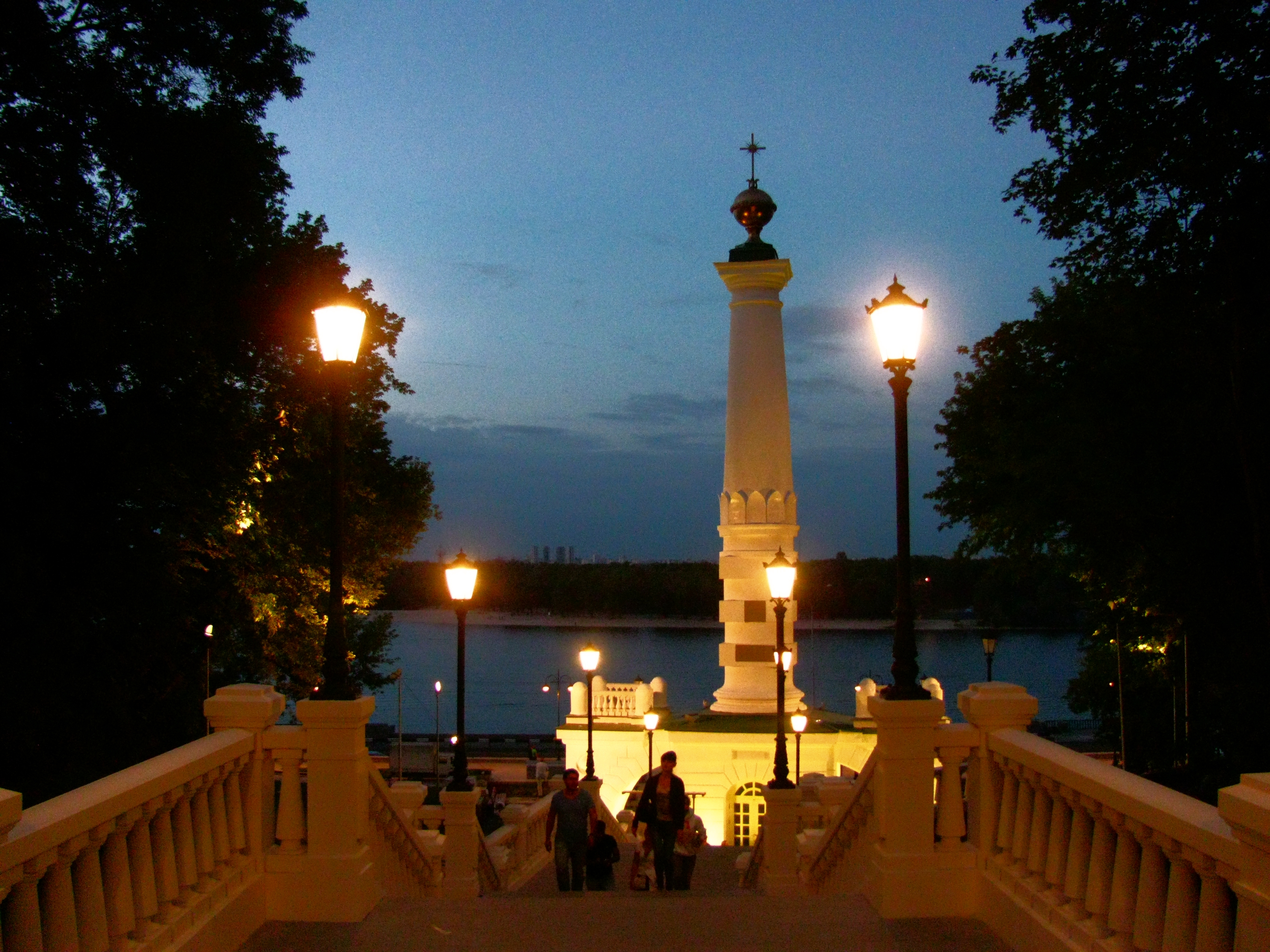 Монумент на честь надання м. Києву Магдебурзького права, Київ, Набережне шосе, 8